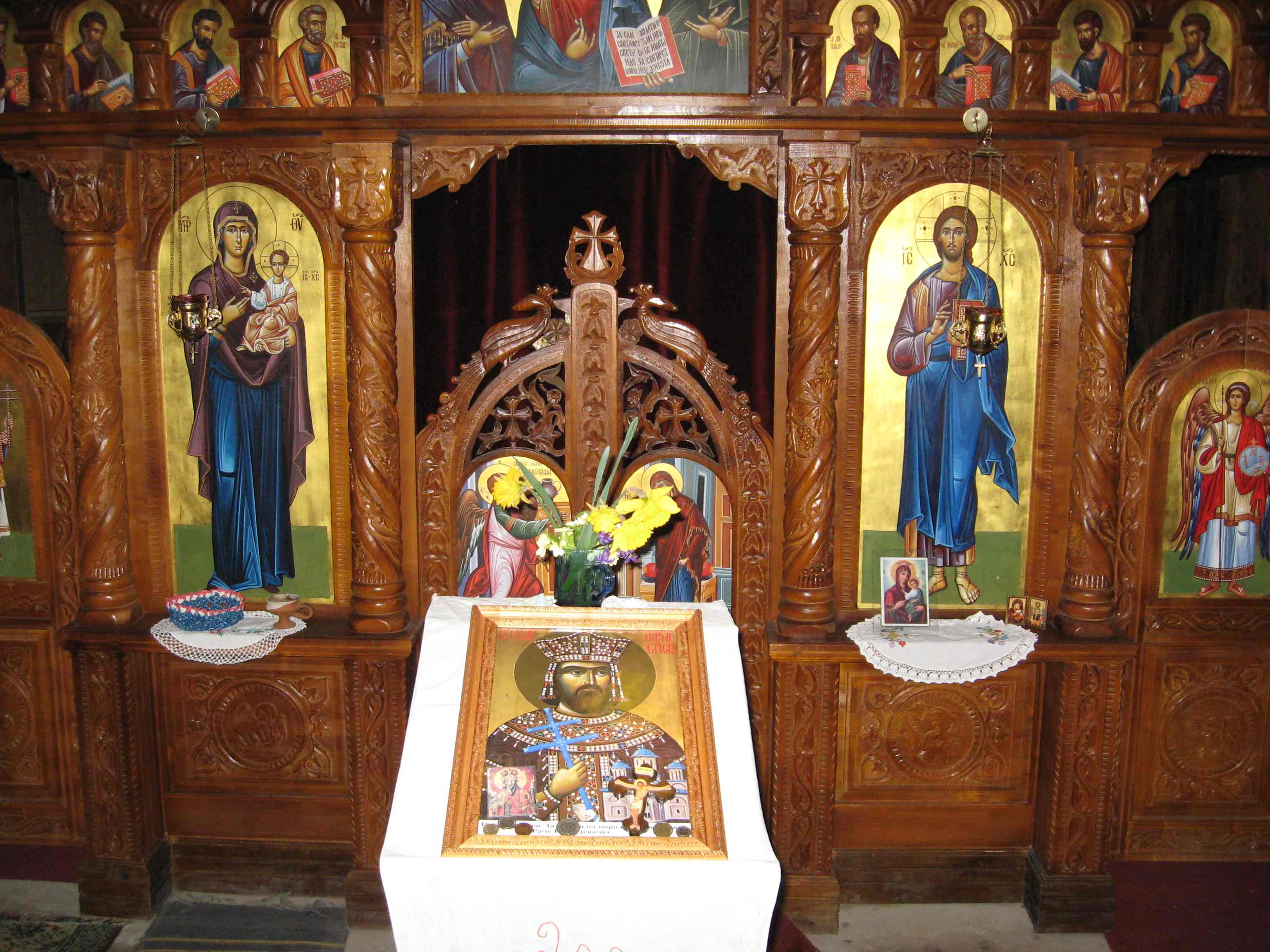 Драган Цветковић Ниш Црква Лазарица Пролом Бања